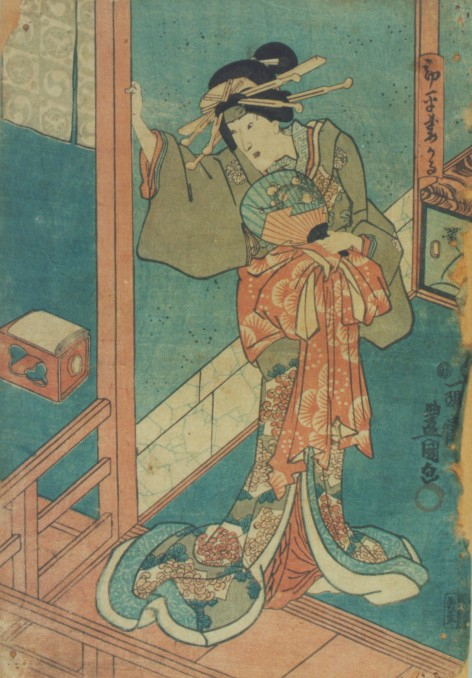 drzeworyt autorstwa Shozo Toyokuni, 1801r, Muzeum Azji i Pacyfiku